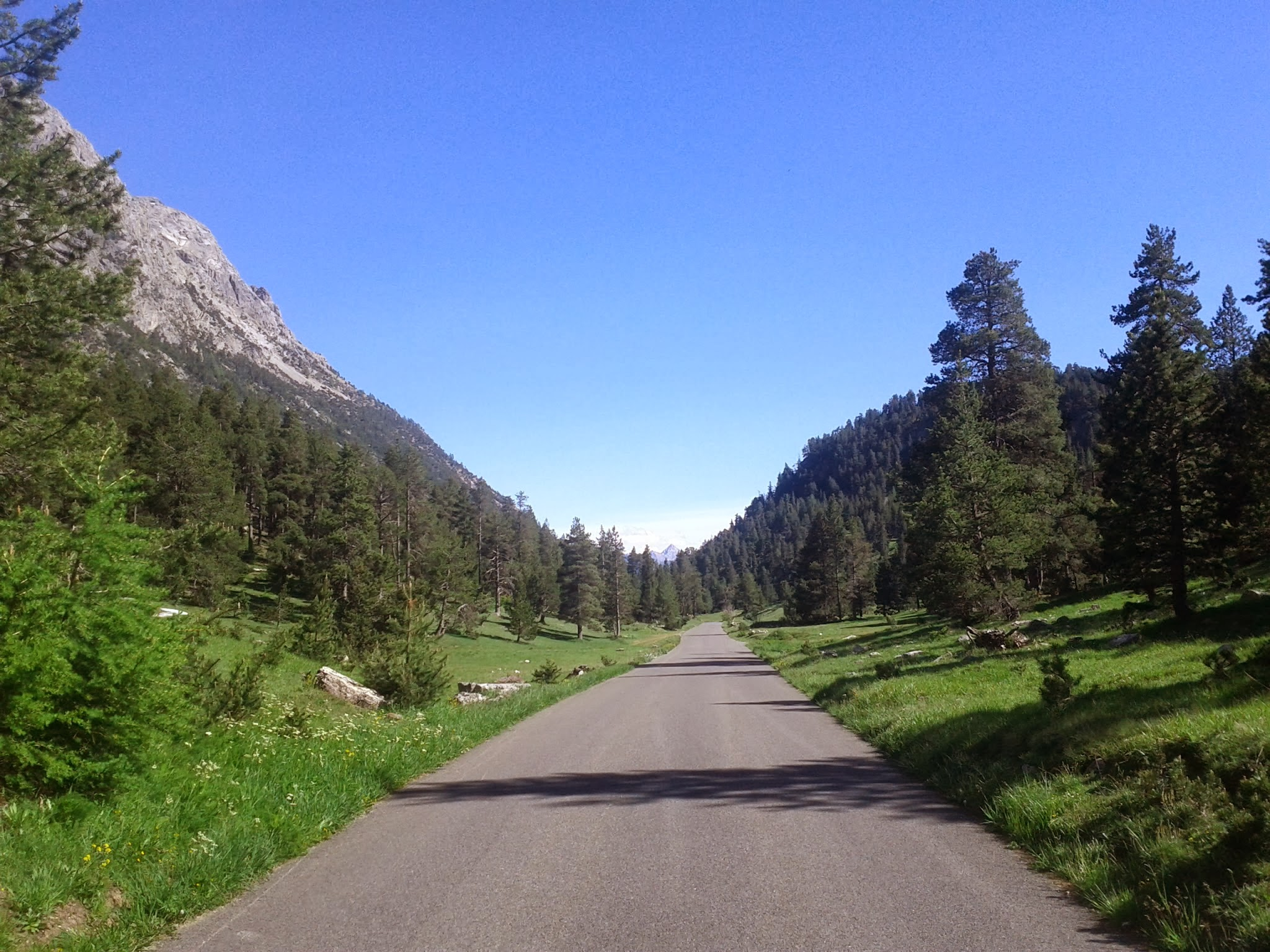 paysage au col de l'Echelle